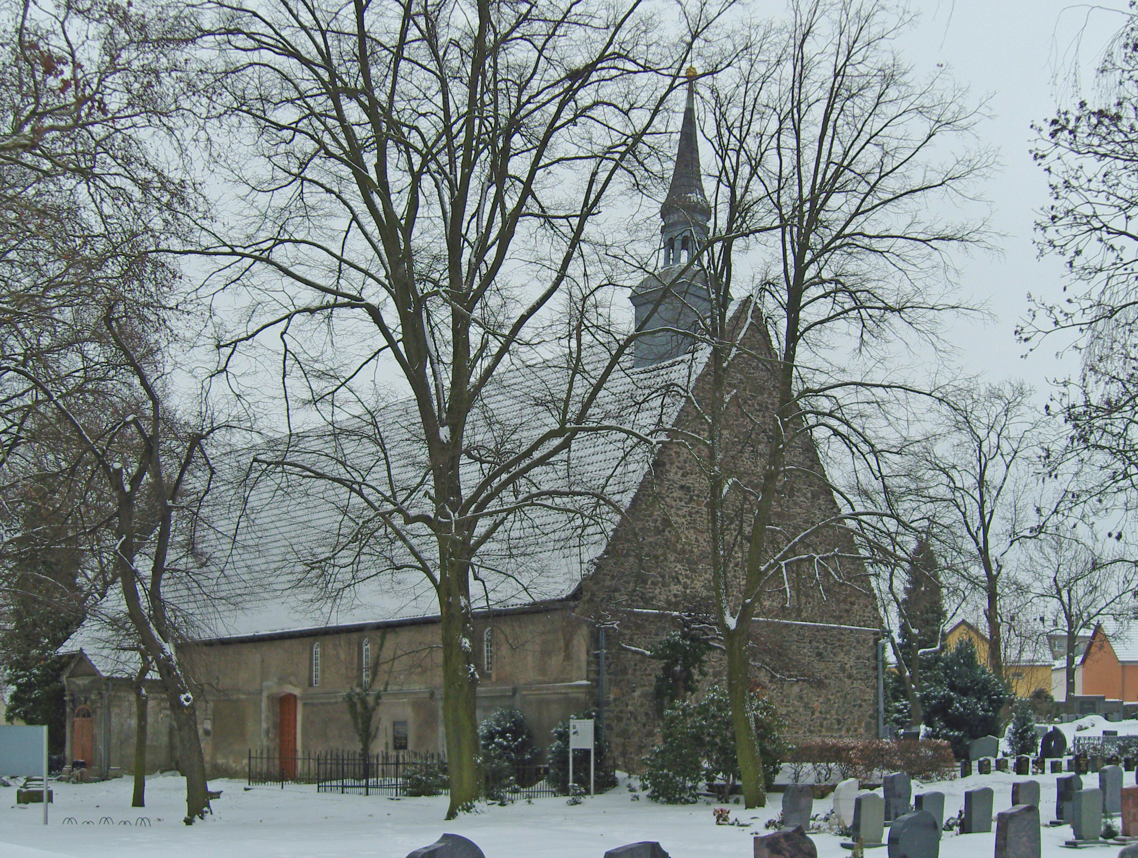 Jacobistraße in Ortrand - Baudenkmal